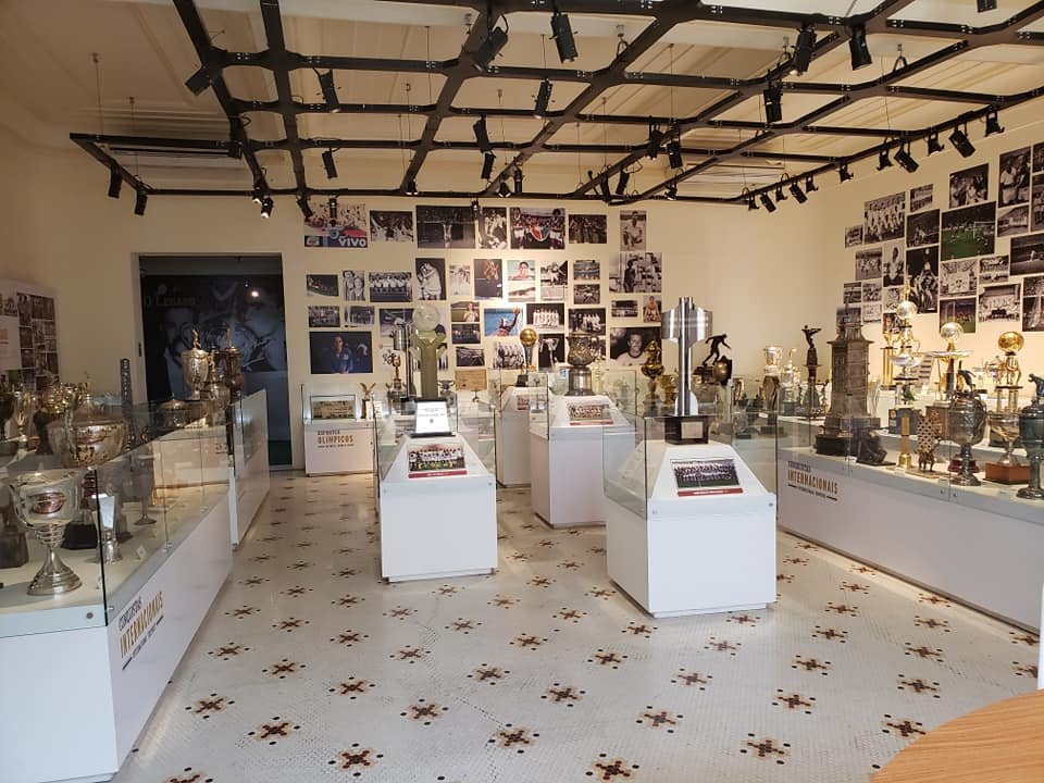 Sala de Troféus do Fluminense Football Club.